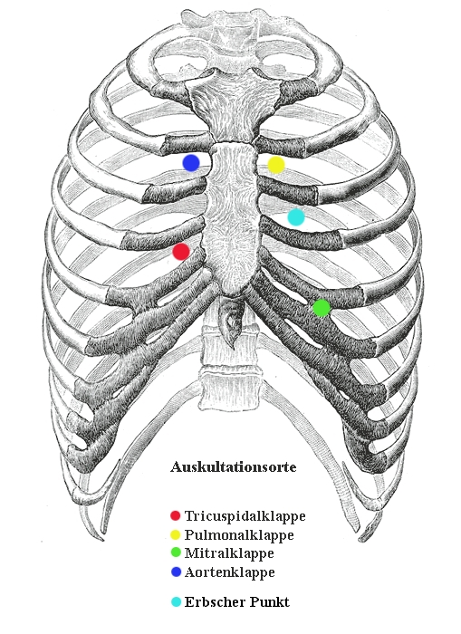 Auskultationsorte der Herztöne auf die Thoraxwand